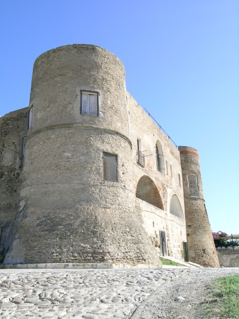 Castello di Bernalda (Basilicata)